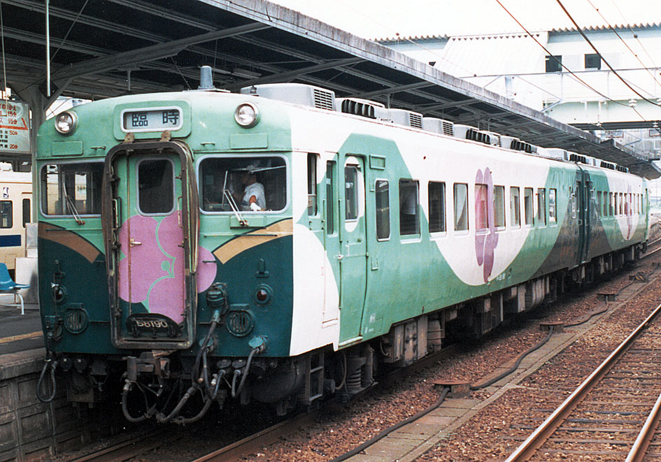 JR九州 キハ58 190+キハ28 2487 「吉四六」